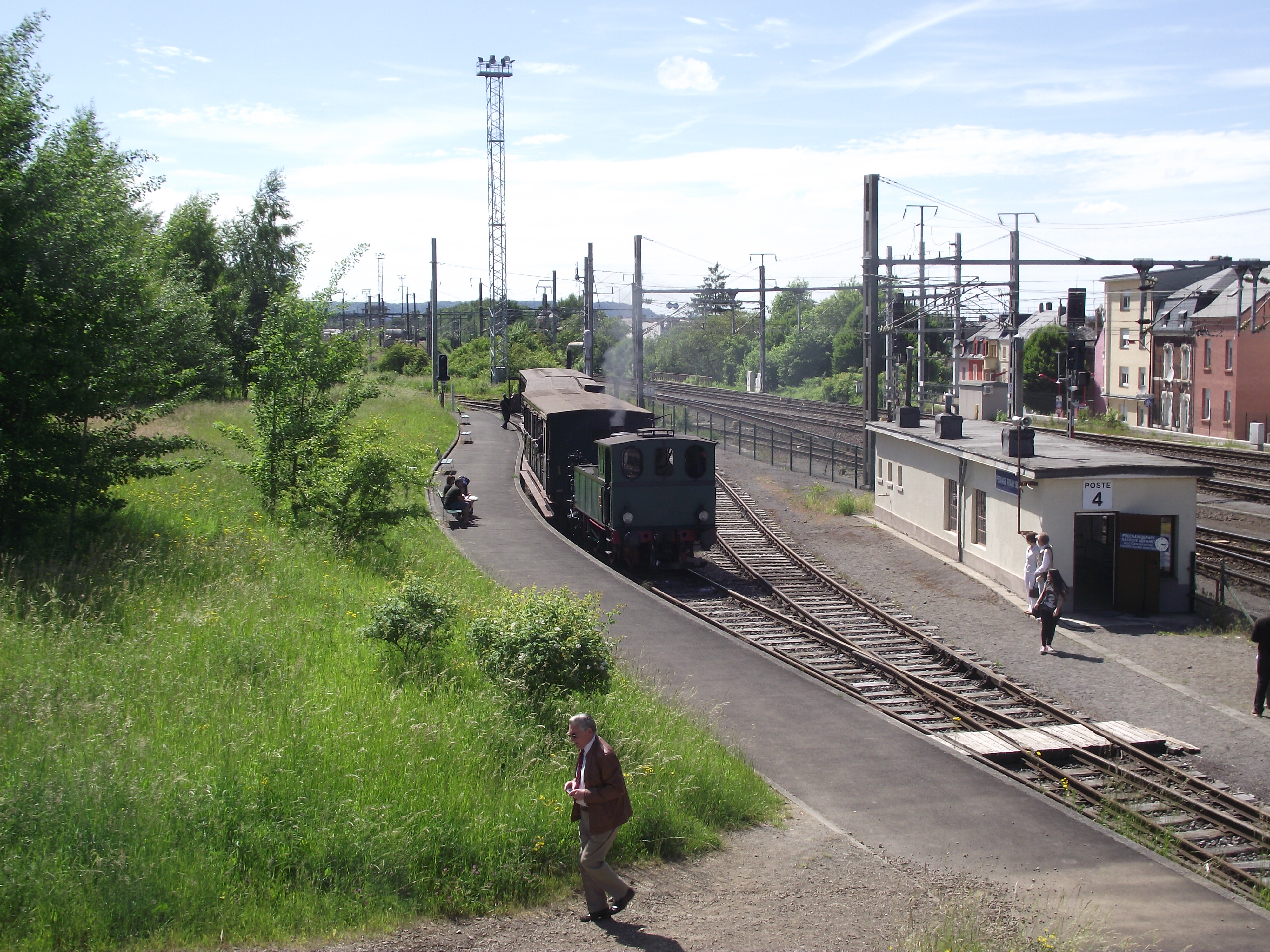 Het museumbedrijf train 1900 in Luxemburg